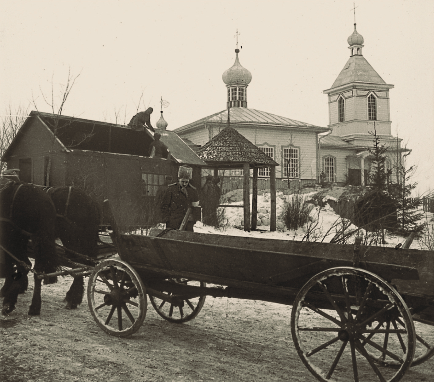 Беларуская (тарашкевіца): Чэрніхава Верхняе (Černichava Vierchniaje). Царква-мураўёўка